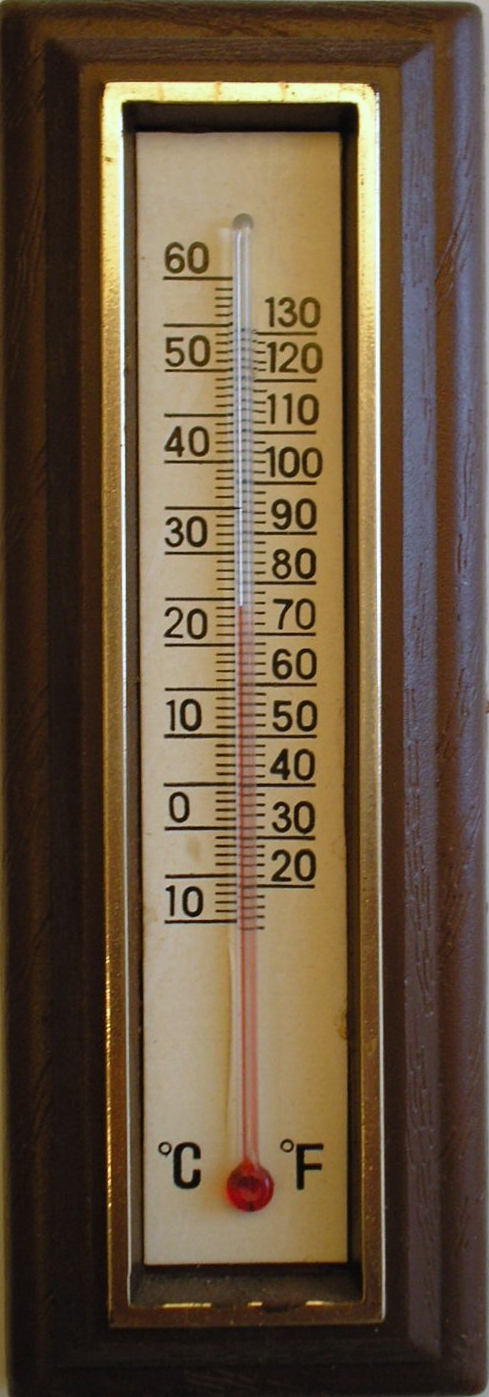 Photo perso